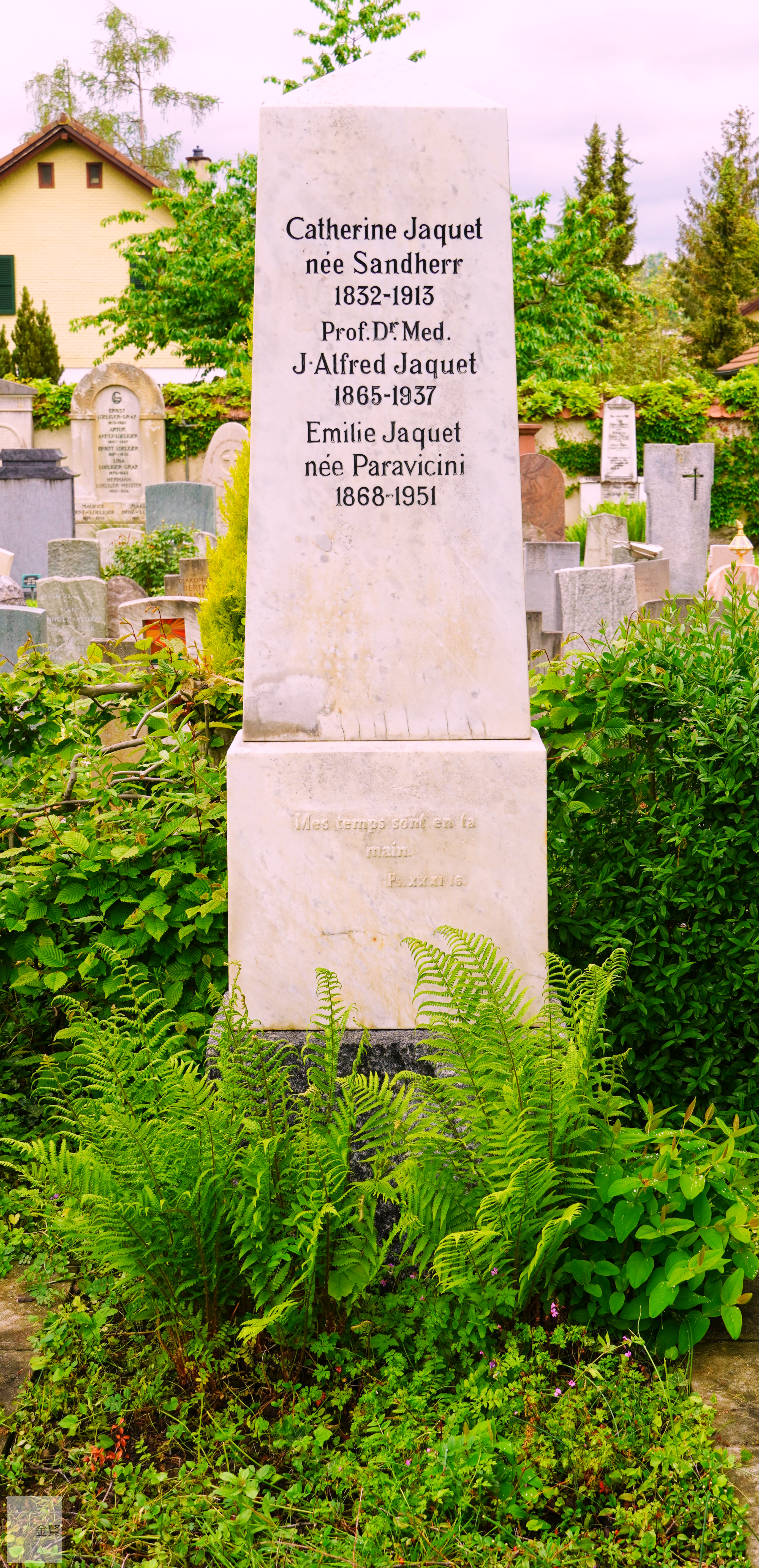 Grab von Catherine Jaquet-Sandherr, Alfred Jaquet und Emmy Jaquet-Paravicini auf dem Gottesacker in Riehen